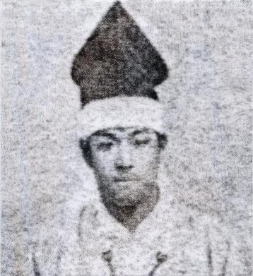 Niwa Nagahiro, daimyo of Nihonmatsu 二本松藩主丹羽長裕